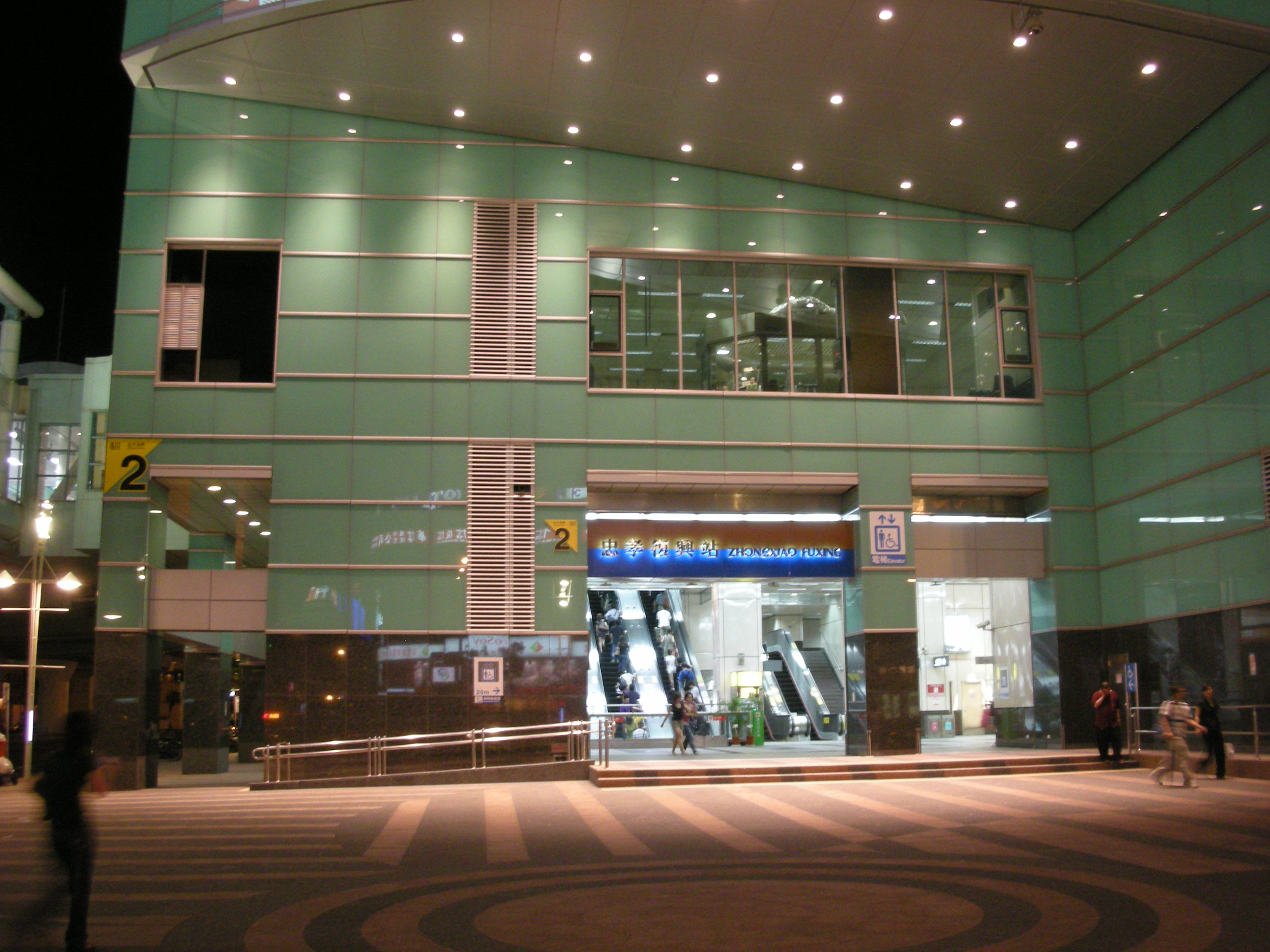 臺北捷運忠孝復興站2號出口夜景。